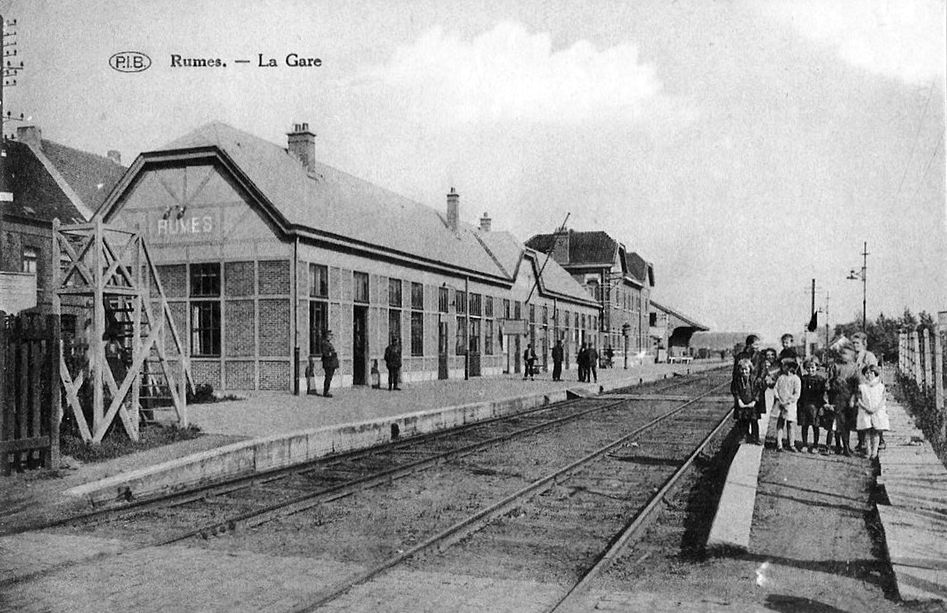 La gare de Rumes reconstruite après les destructions de la Première Guerre mondiale.